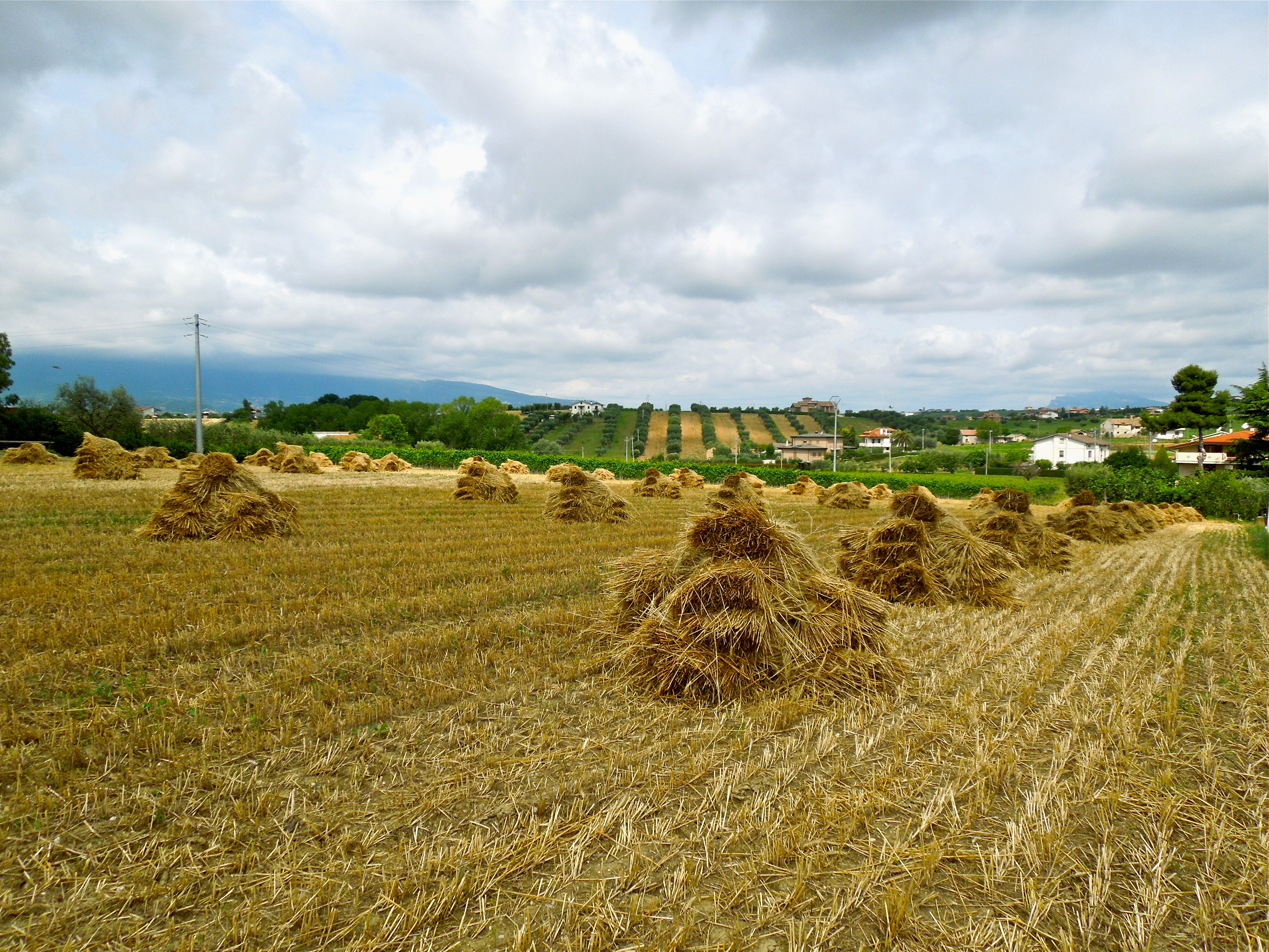 Campo di grano, mietuto e raccolto a mano nel territorio del comune di Ancarano.